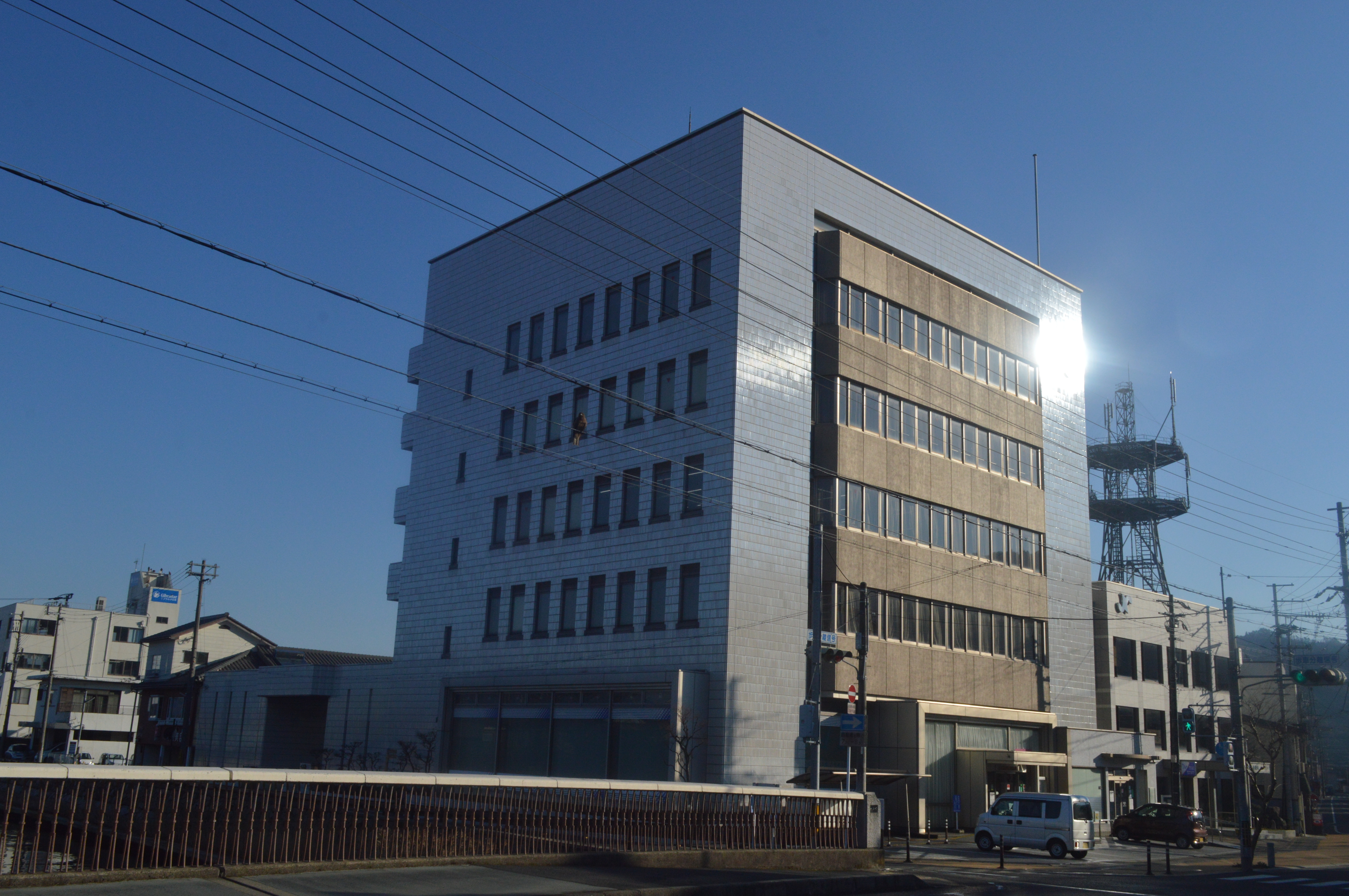 京都府宮津市にある京都北都信用金庫本店。大手橋から撮影。